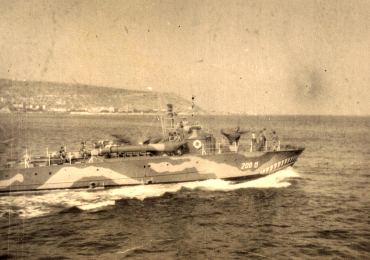 טרפדת ט-208 מגיעה לפינוי פצועים מאח"י מזנק לאחר קרב איברהים אל-אוול 31 באוקטובר 1956